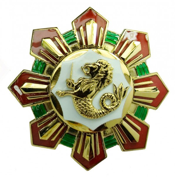 Filipińskia Legia Honorowa